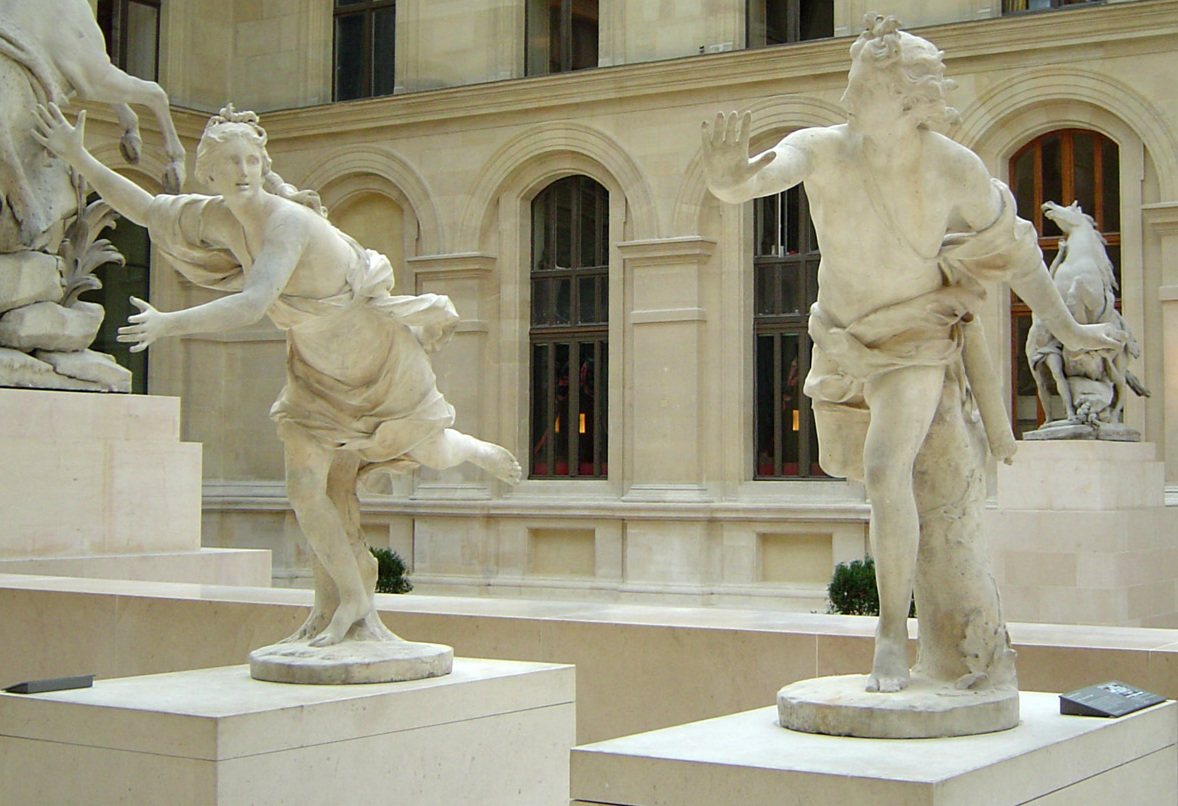 Groupe de Daphné et Apollon. respectivement Daphné poursuivie par Apollon et Apollon poursuivant Daphné